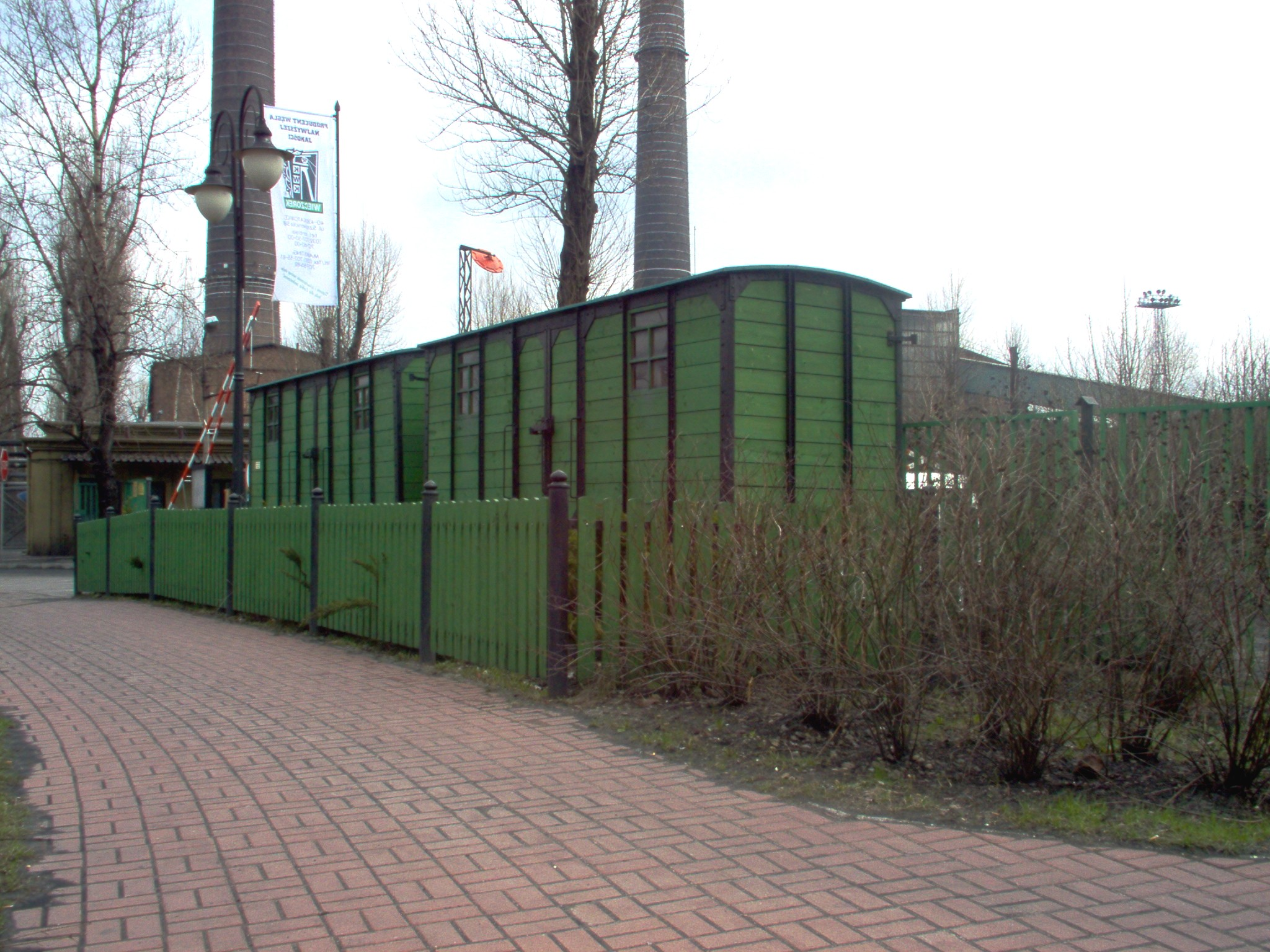 Wagoniki kolejki wąskotorowej "Balkan" obok szybu Pułaskiego kopalni "Wieczorek" w Nikiszowcu. Zdjęcie wykonane przeze mnie w kwietniu 2006 r.